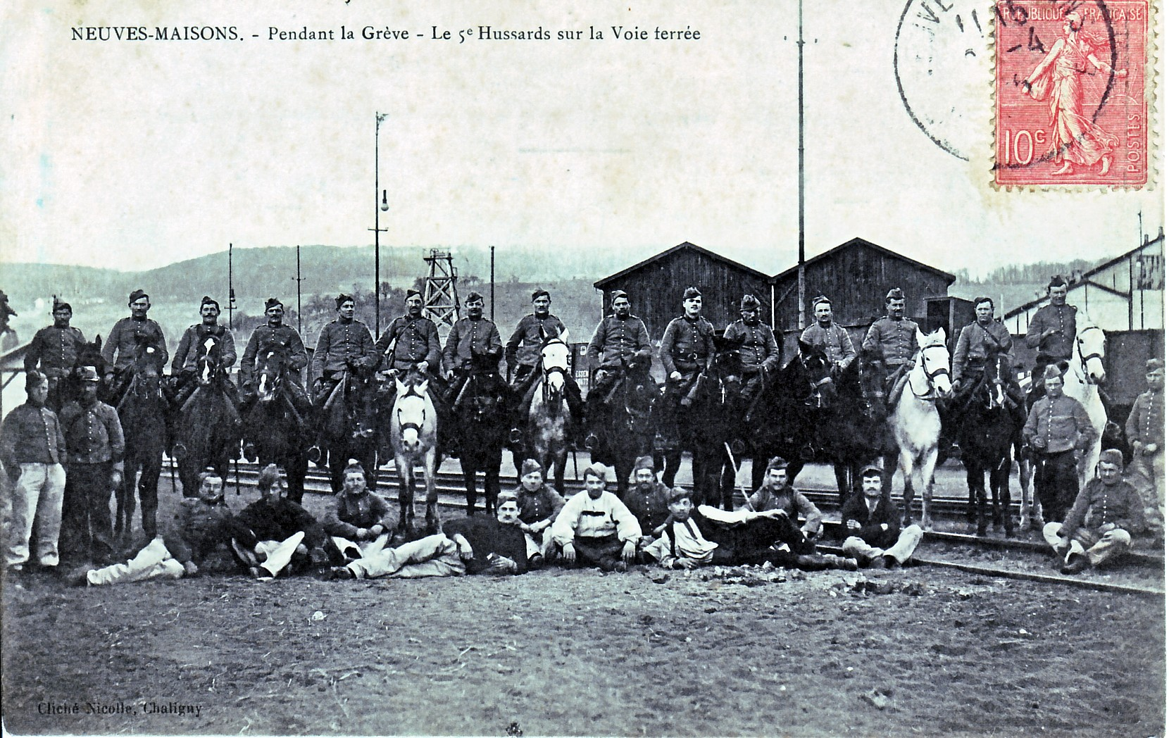 le 5e Hussards pendant les grèves de Neuf-Maison